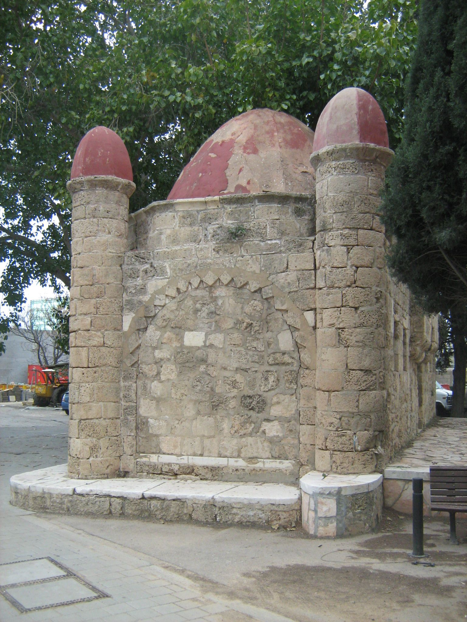 סביל אבו נבוט בדרך בן צבי